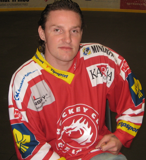 Po zakončení sezóny 2014/15 ve Werk Areně